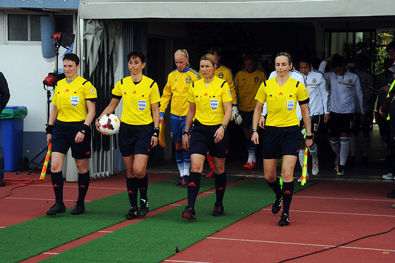 a_25_4985